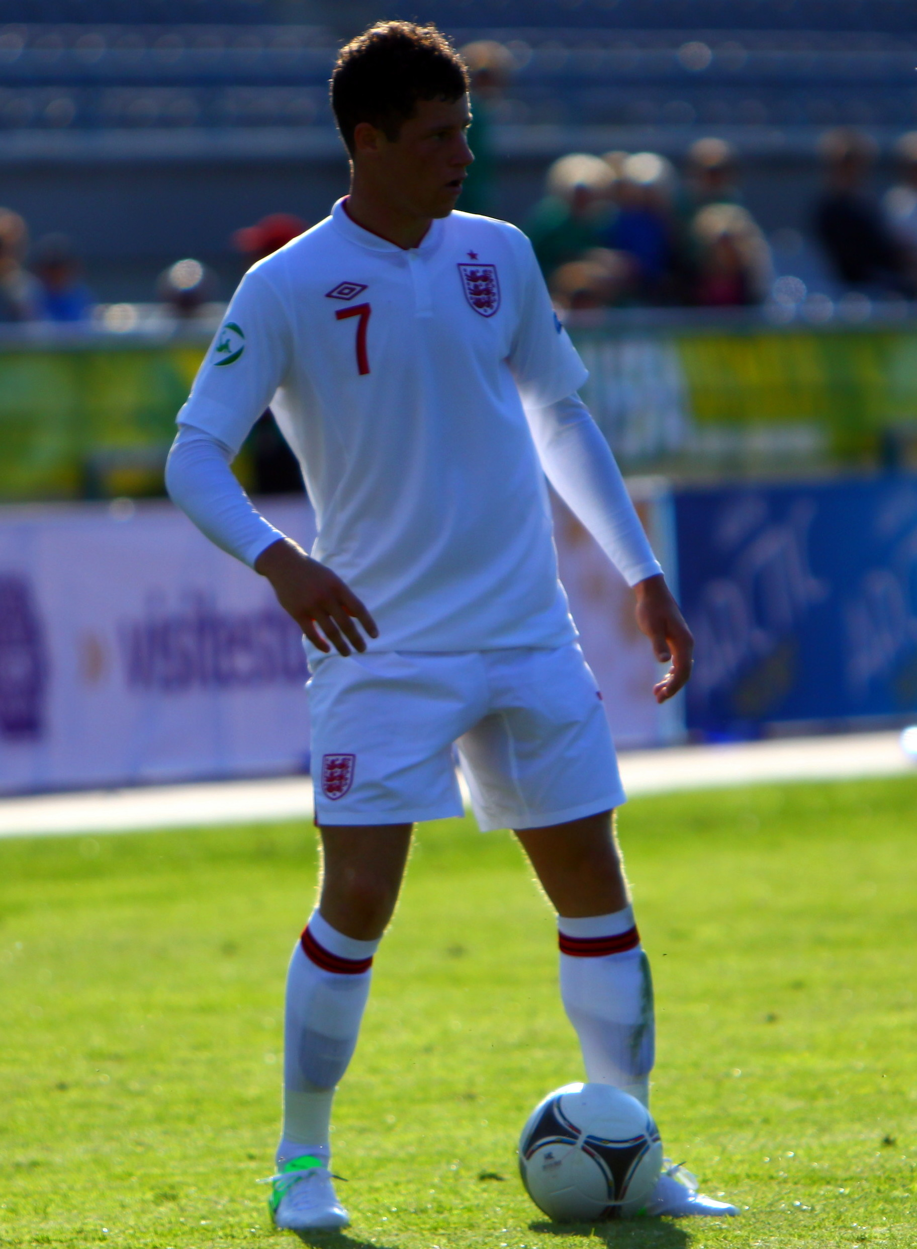 Ross Barkley